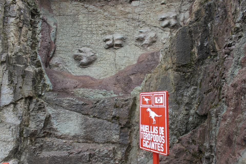 Huellas de dinosaurios terópodos en la carretera Antamina.